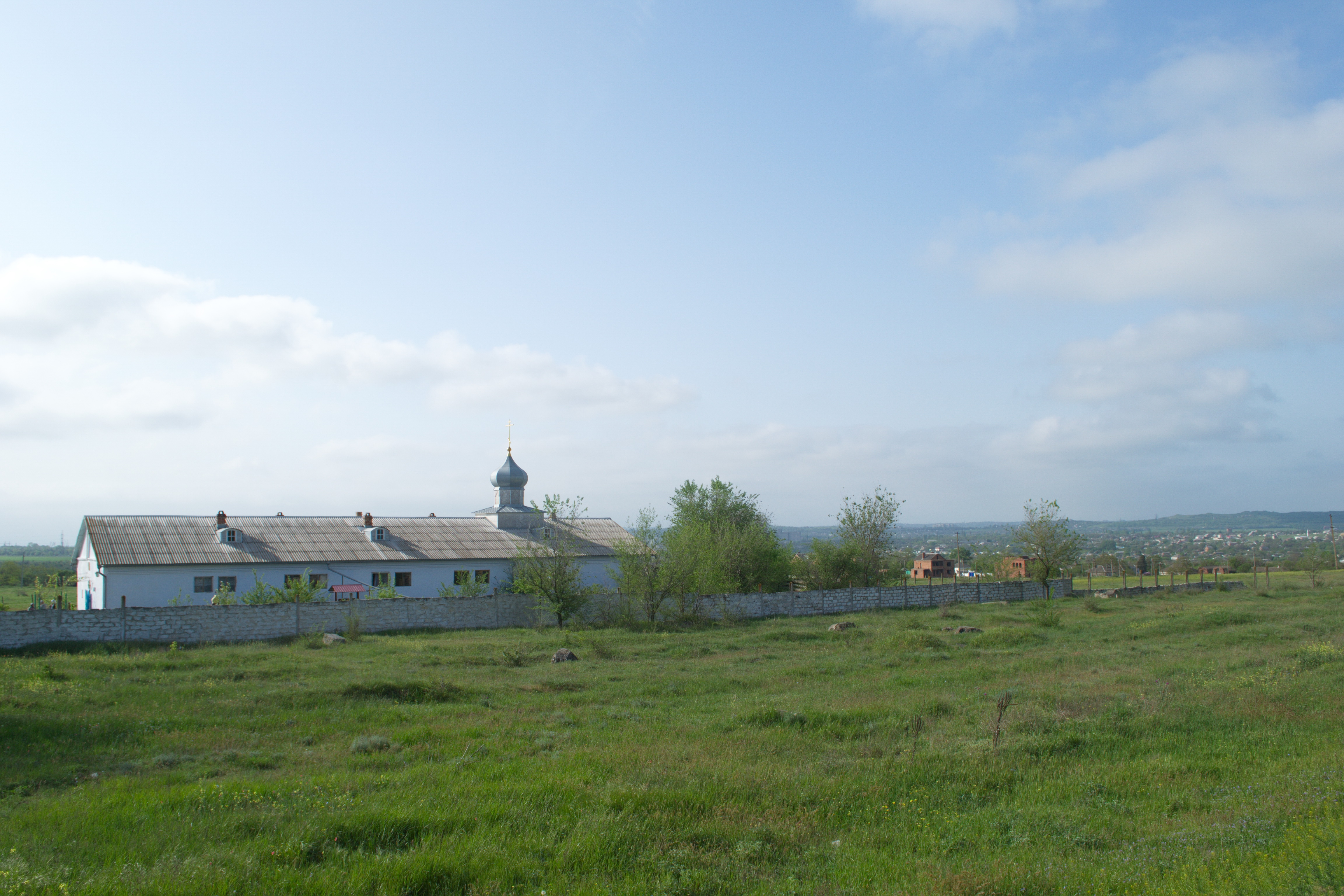 Вид Катерлезского монастыря с дороги